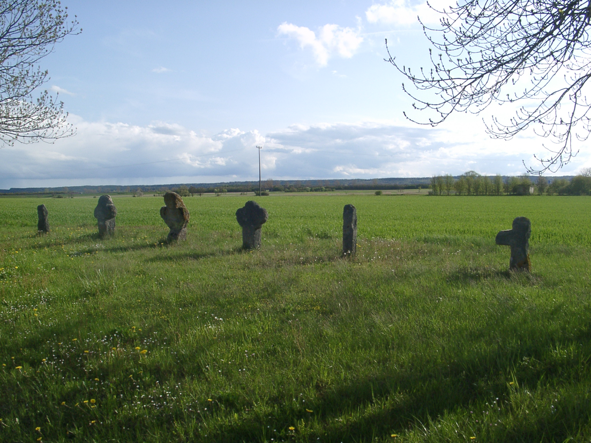 Neunstetten